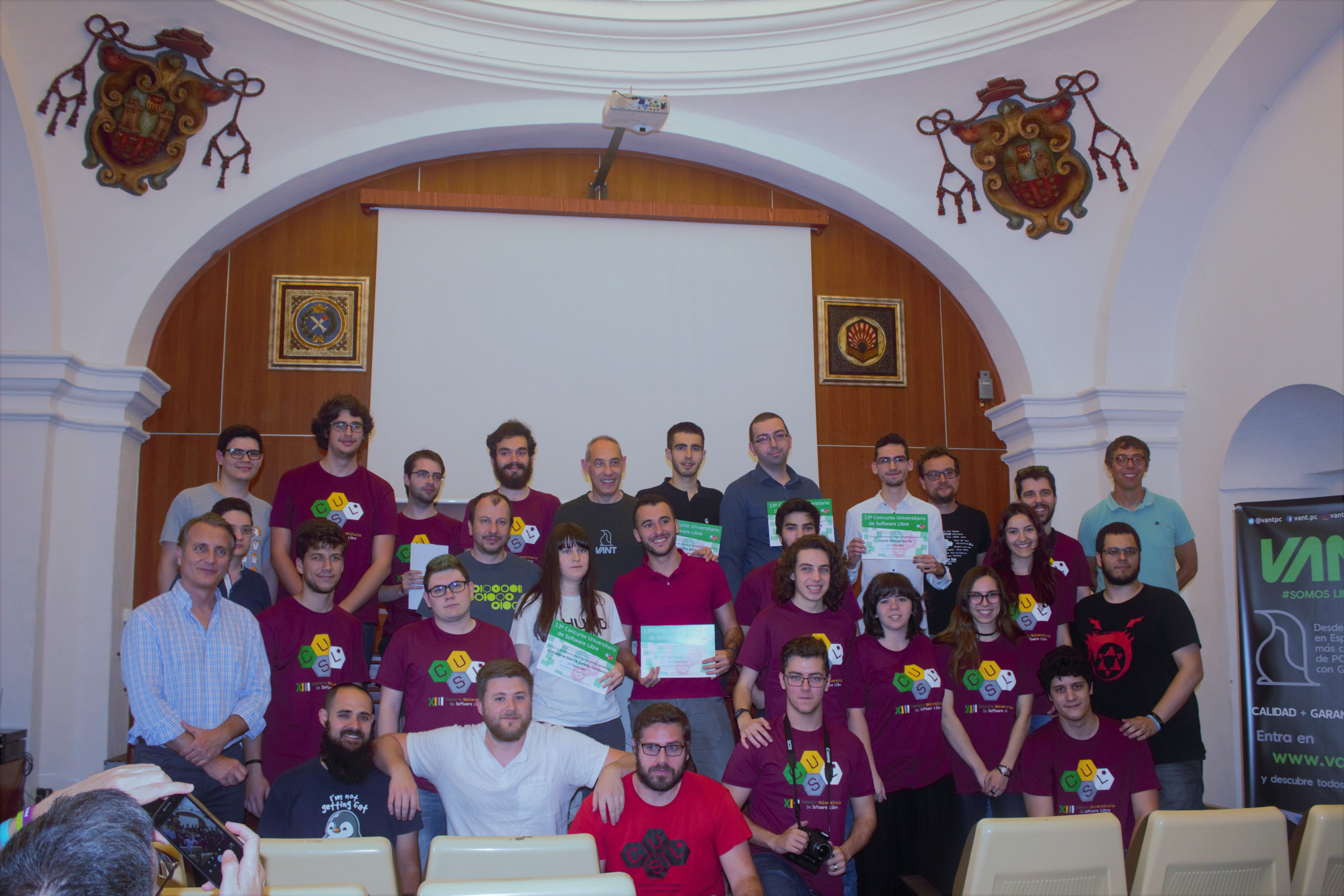 Foto grupal de clausura de la Fase Final XIII